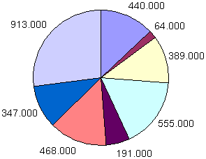 Répartition des billets d'entrée de la coupe du monde 2006 de football